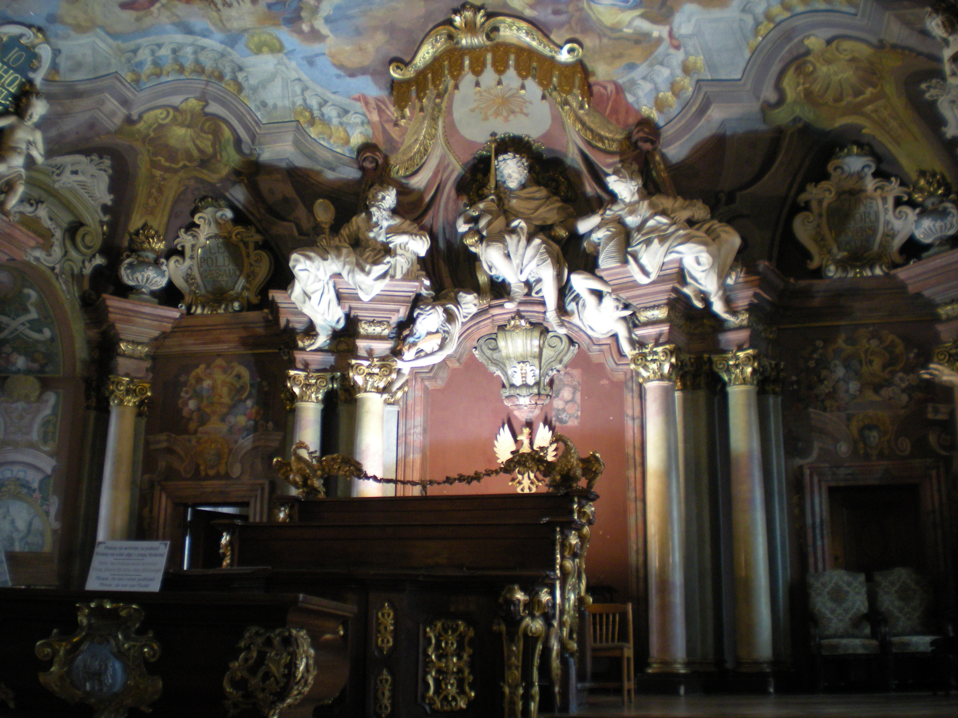 foto del podio dell'Aula Leopoldina di Breslavia